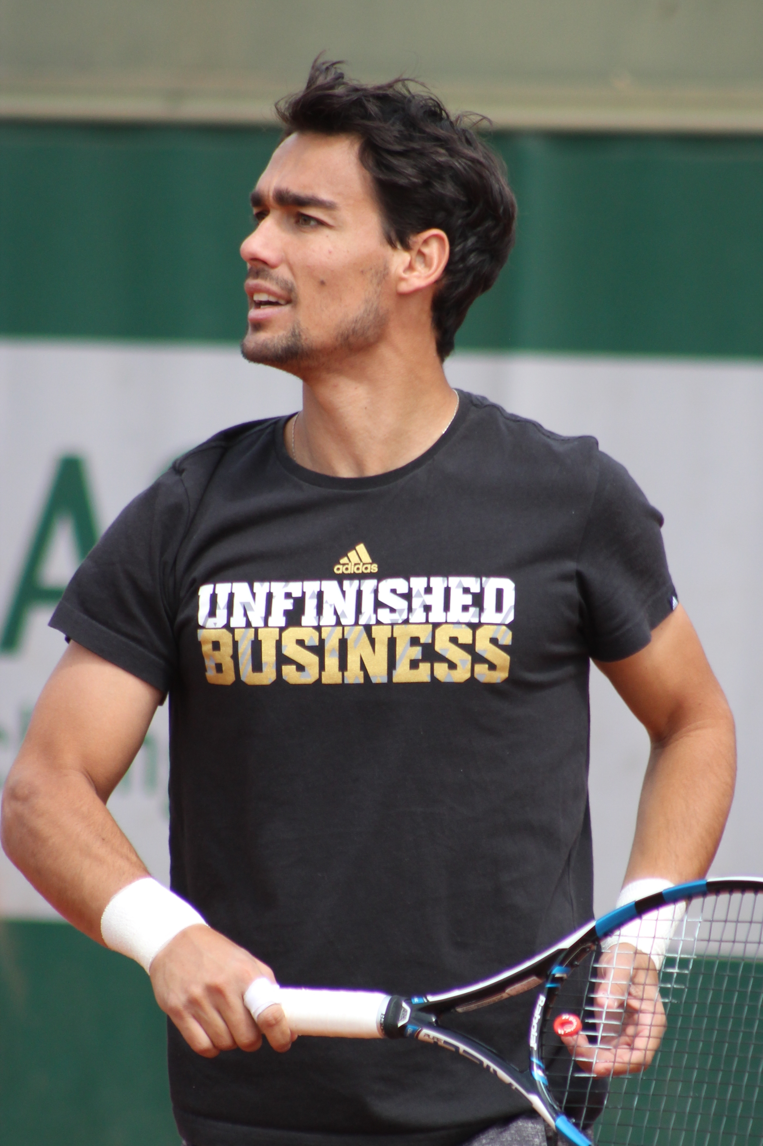 Fognini RG15 (10)